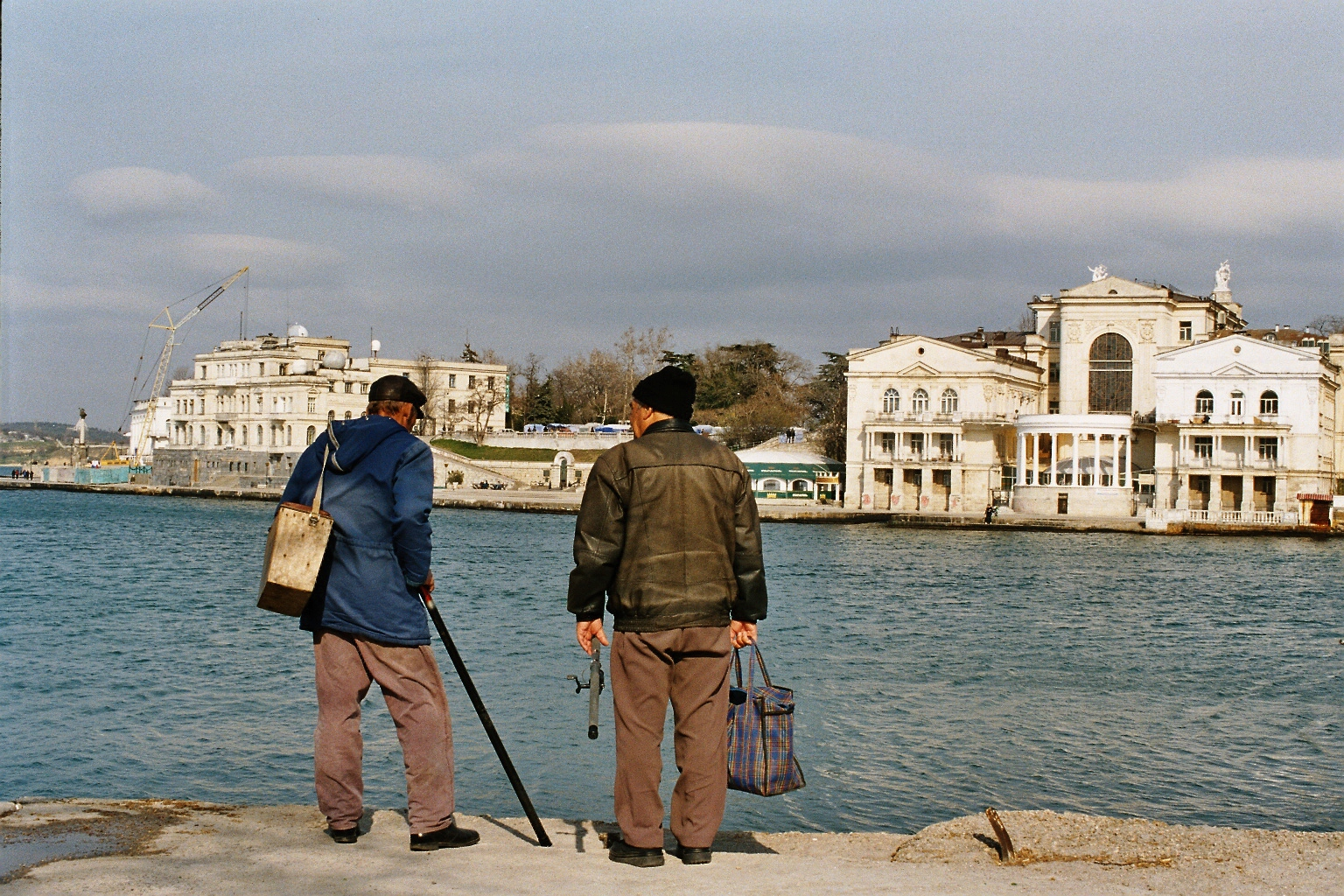 Ukraine, Sewastopol, Fischer im Hafen vor dem Meeresinstitut